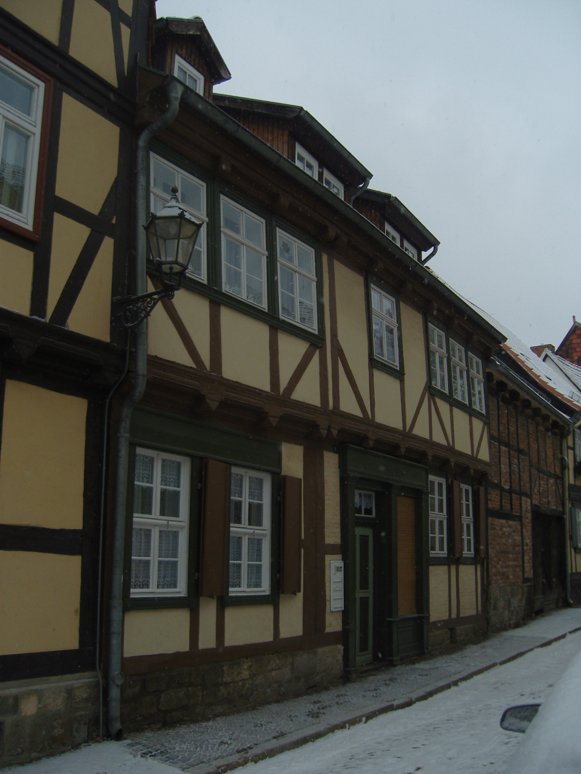 Denkmalgeschütztes Fachwerkgebäude in der Schulstraße 6 in Quedlinburg